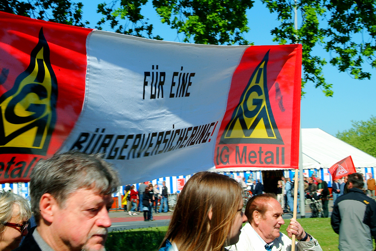 Erste Auswahl nachbearbeiteter Fotos von Arbeiten, Aktionen und Geschehenissen vom 1. Mai 2011 in Hannover rund um den Klagesmarkt. Sollten Sie weiterführende Bilder oder gar historische Dokumente besitzen, bitten wir höflich um Ihre Ergänzung.